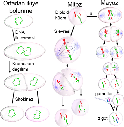 Three cell growth types - Üç farklı hücre çoğalması yöntemi